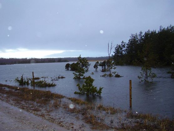 Saulepi rannaniit